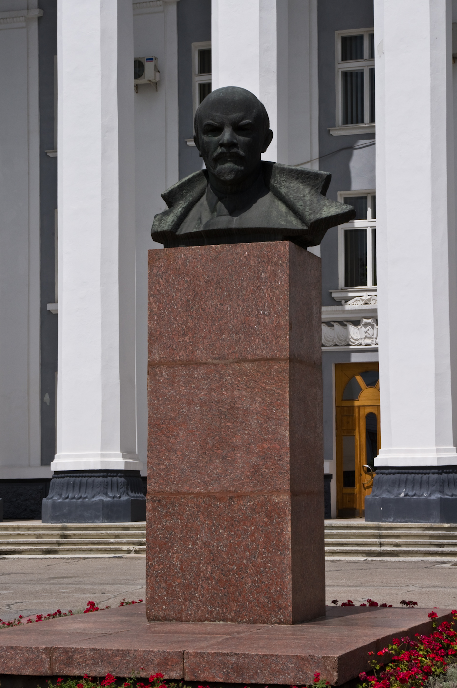 Памятник Ленину в Тирасполе